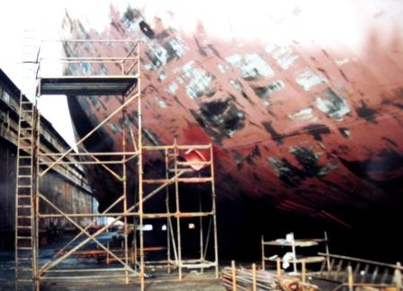 Hinterschiff mit Austrittsscoop